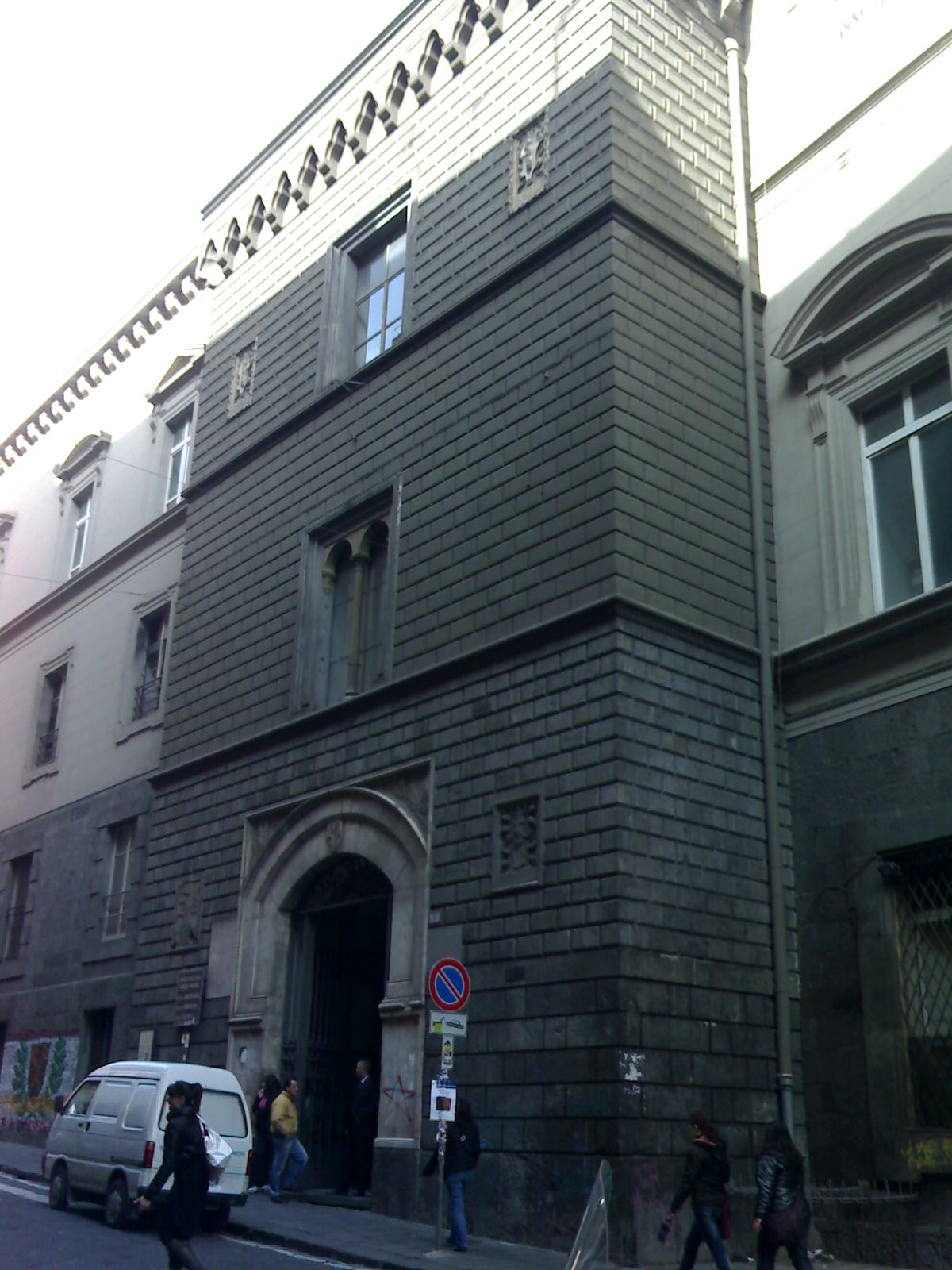 Museo di scienze mineralogiche di Napoli. Federico II